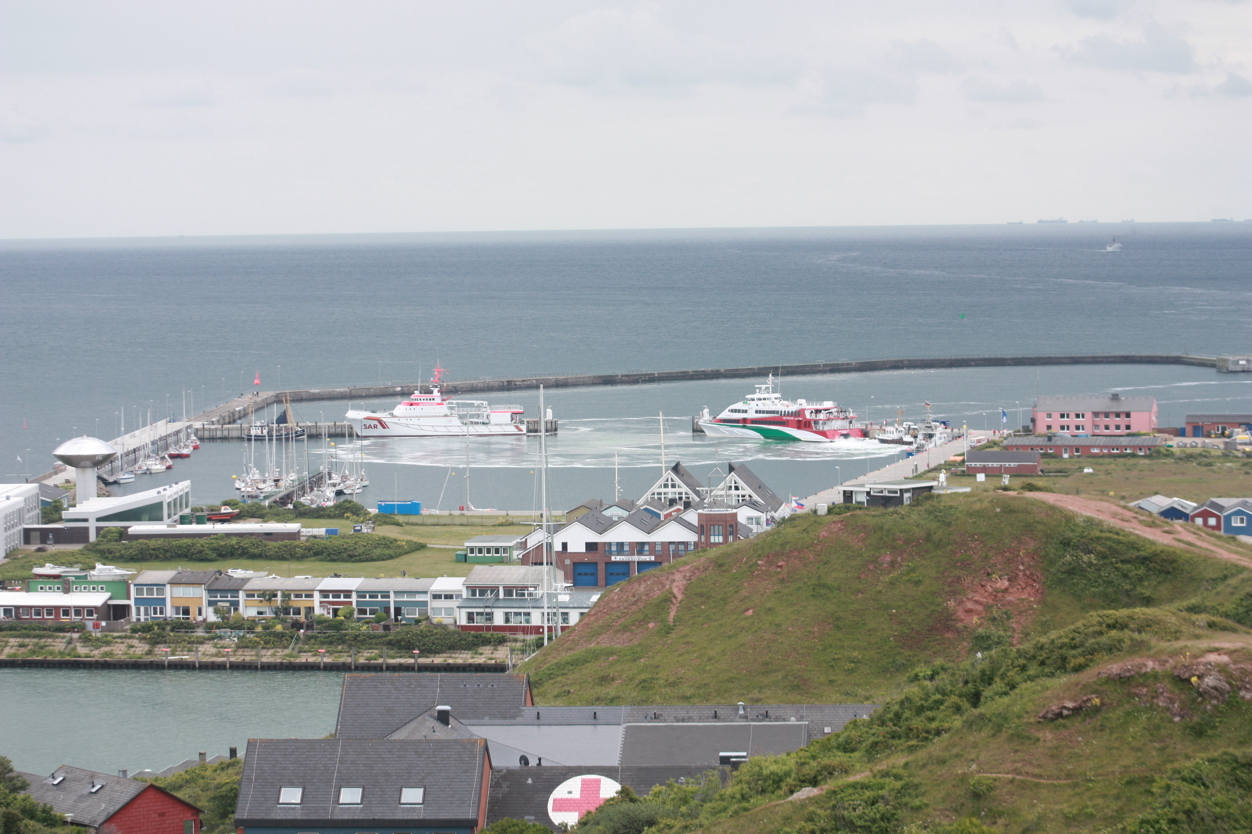 Heligoland, Helgoland